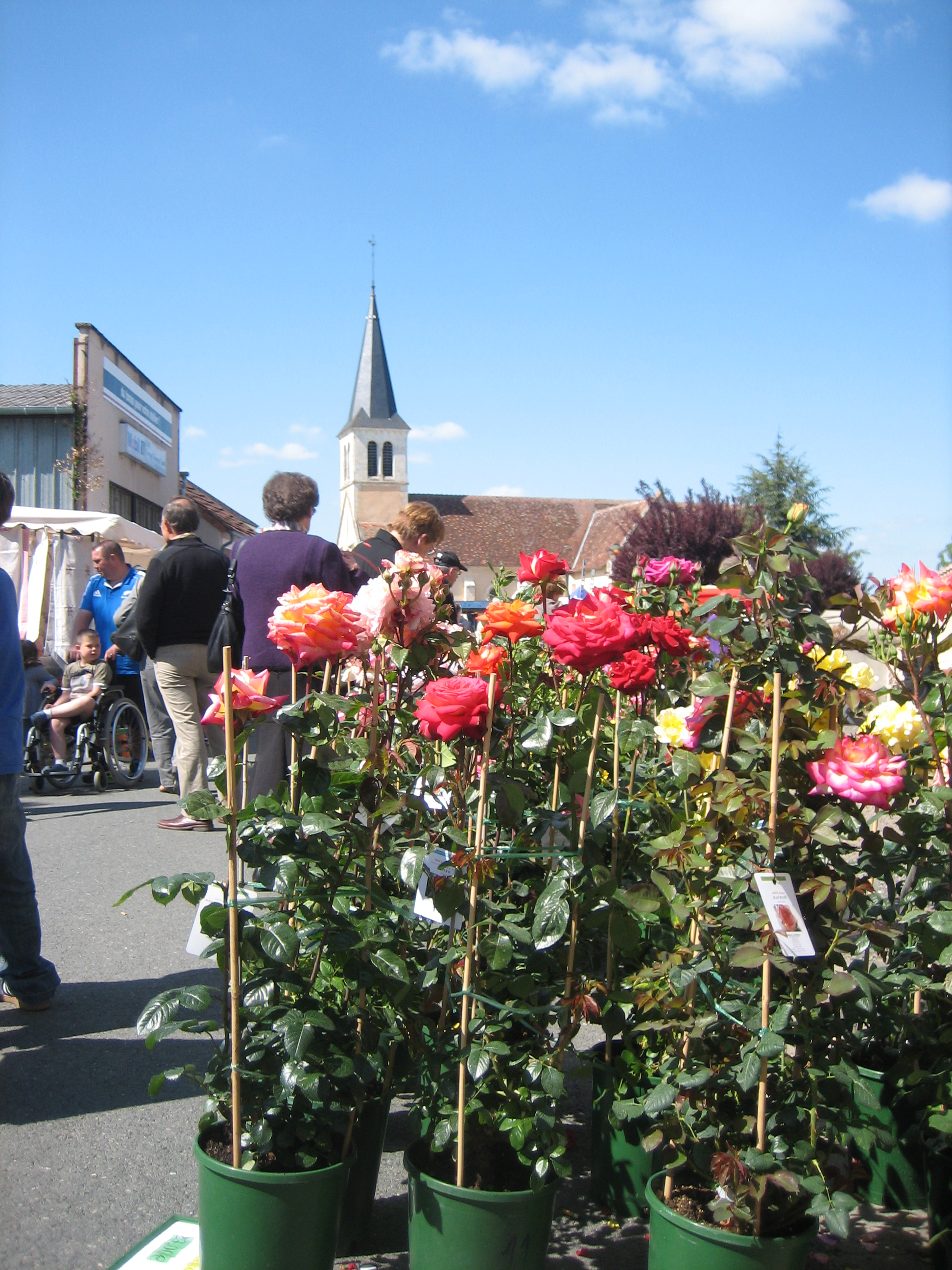 Église de Mers sur Indre, photo prises pendant la foire aux plants